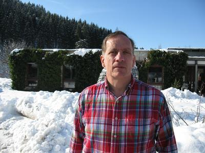 Foto di Colin McLarty